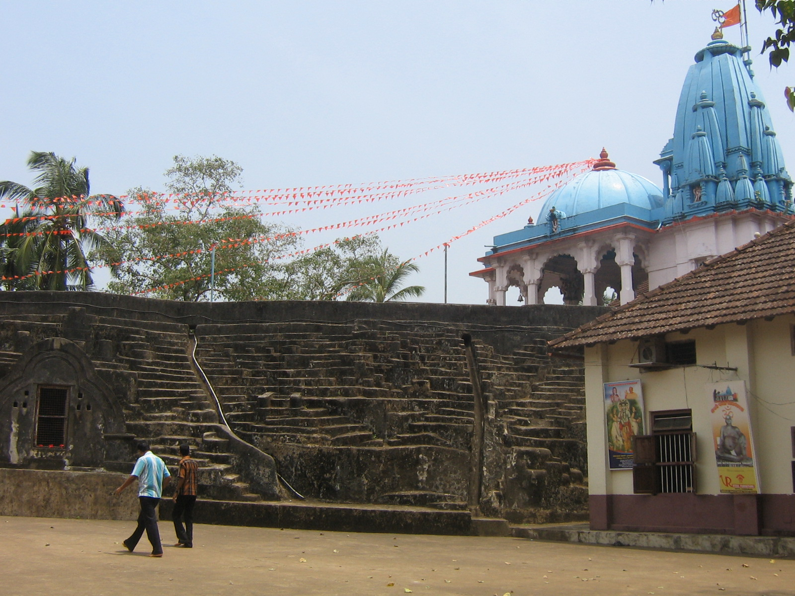 Nithyananda Ashramam Kanhangad